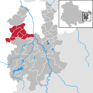 Verwaltungsgemeinschaft Münchenbernsdorf in Thuringia - District Greiz